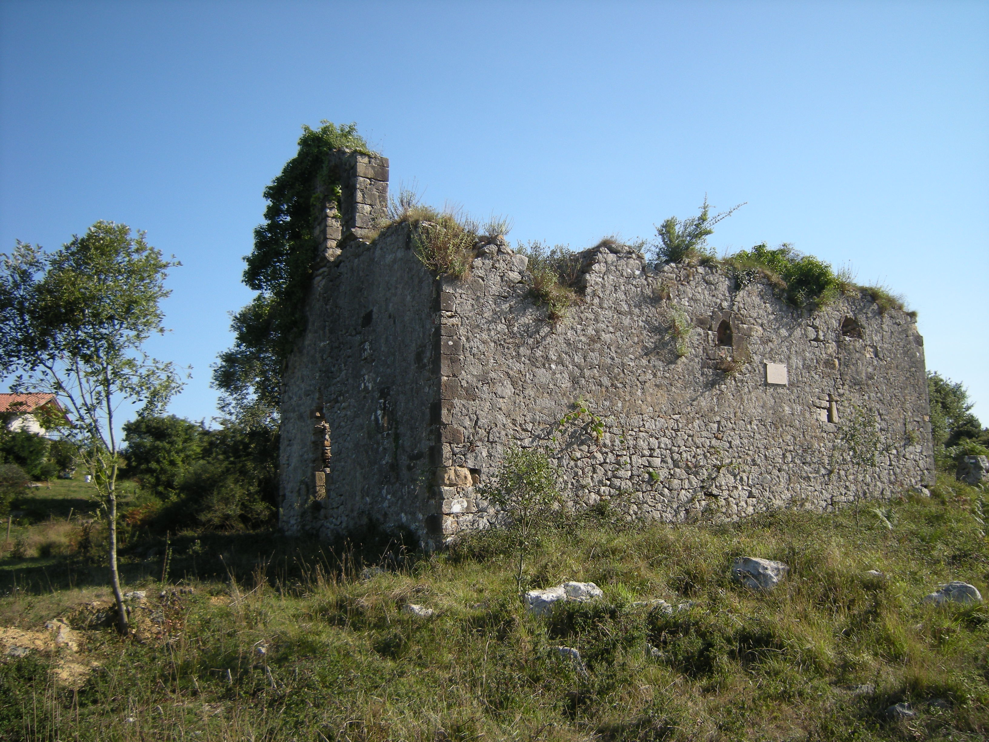 Ermita de San Julián de Liendo (Cantabria, España